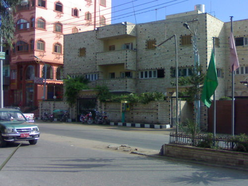 هنا مركز الإدارة في المدينة والذى يوجد به ماكينات بنكية ومرفق لبيع لحوم مدعمة للجيش المصري